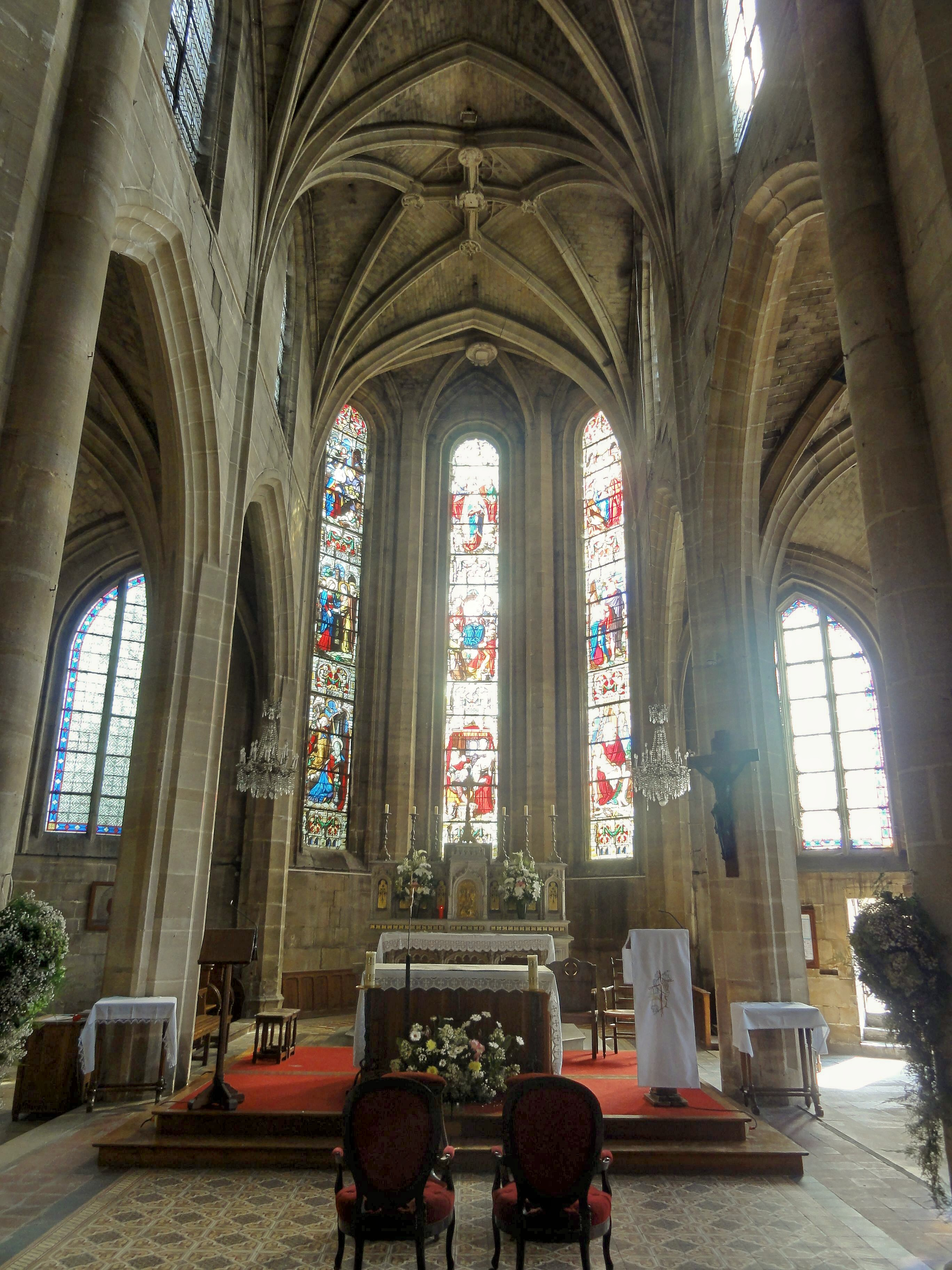 Chœur.